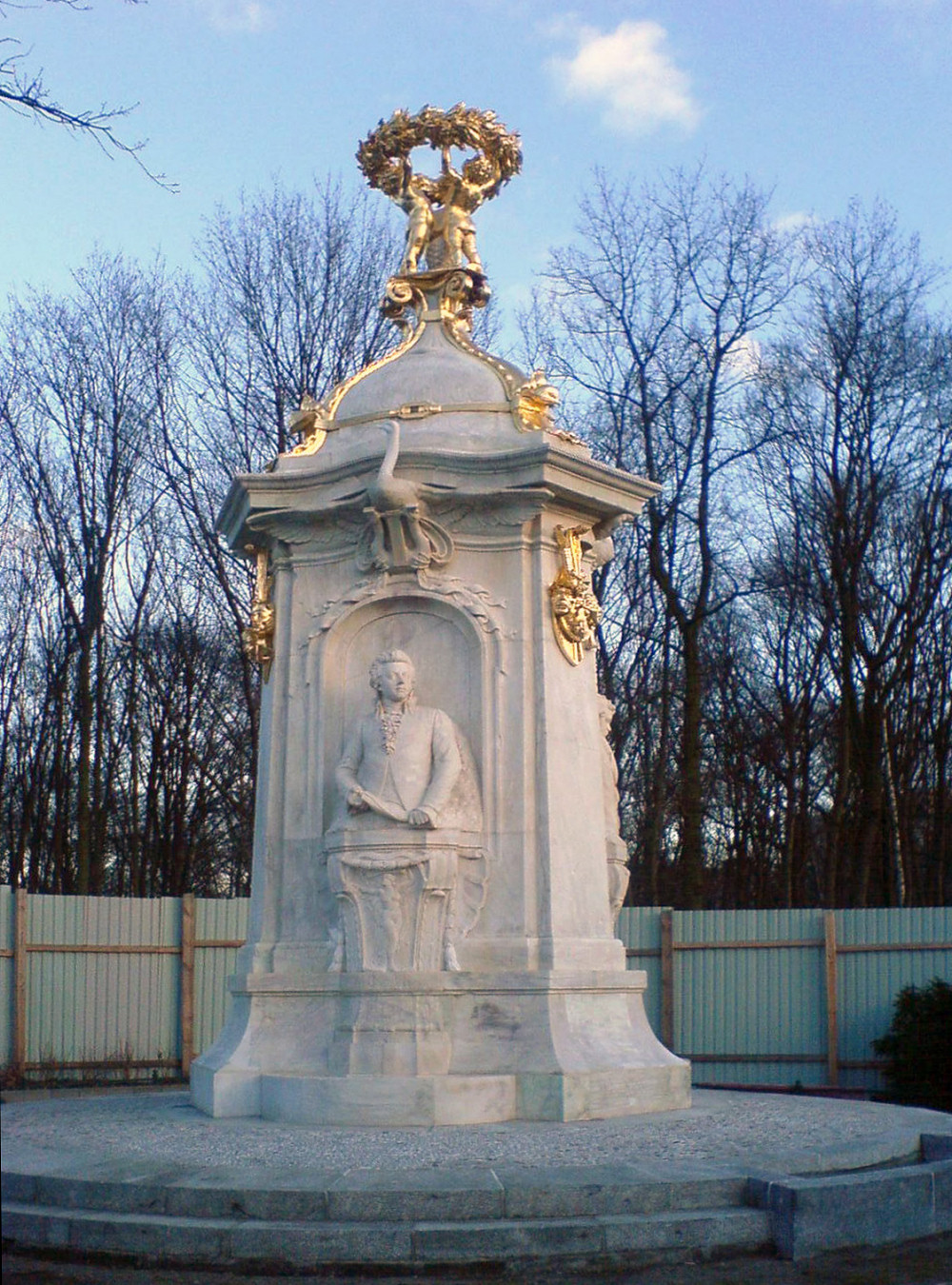 Beethoven-Haydn-Mozart-Denkmal, Berlin-Tiergarten. Bildhauer: Rudolf Siemering